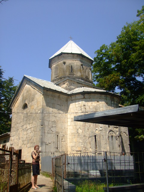 Zugdidi